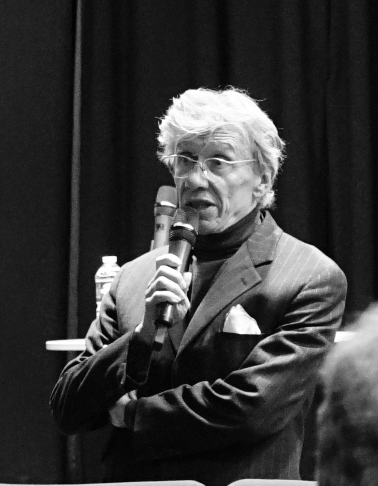 conférence à la médiathèque Falala.